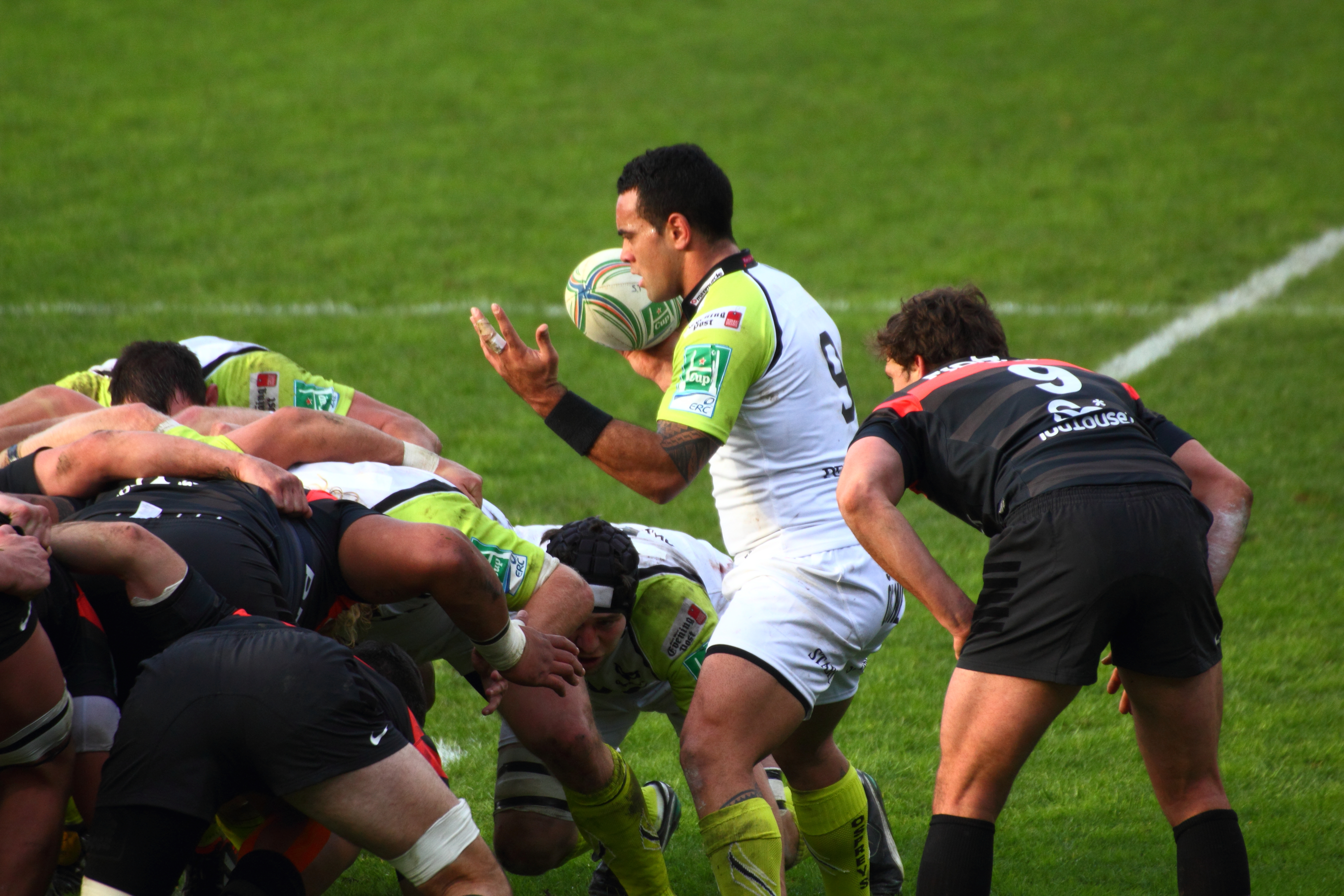 Heineken Cup 2012-2013 — 8 décembre 2012, Stade Ernest Wallon. Match between: Stade toulousain — Ospreys